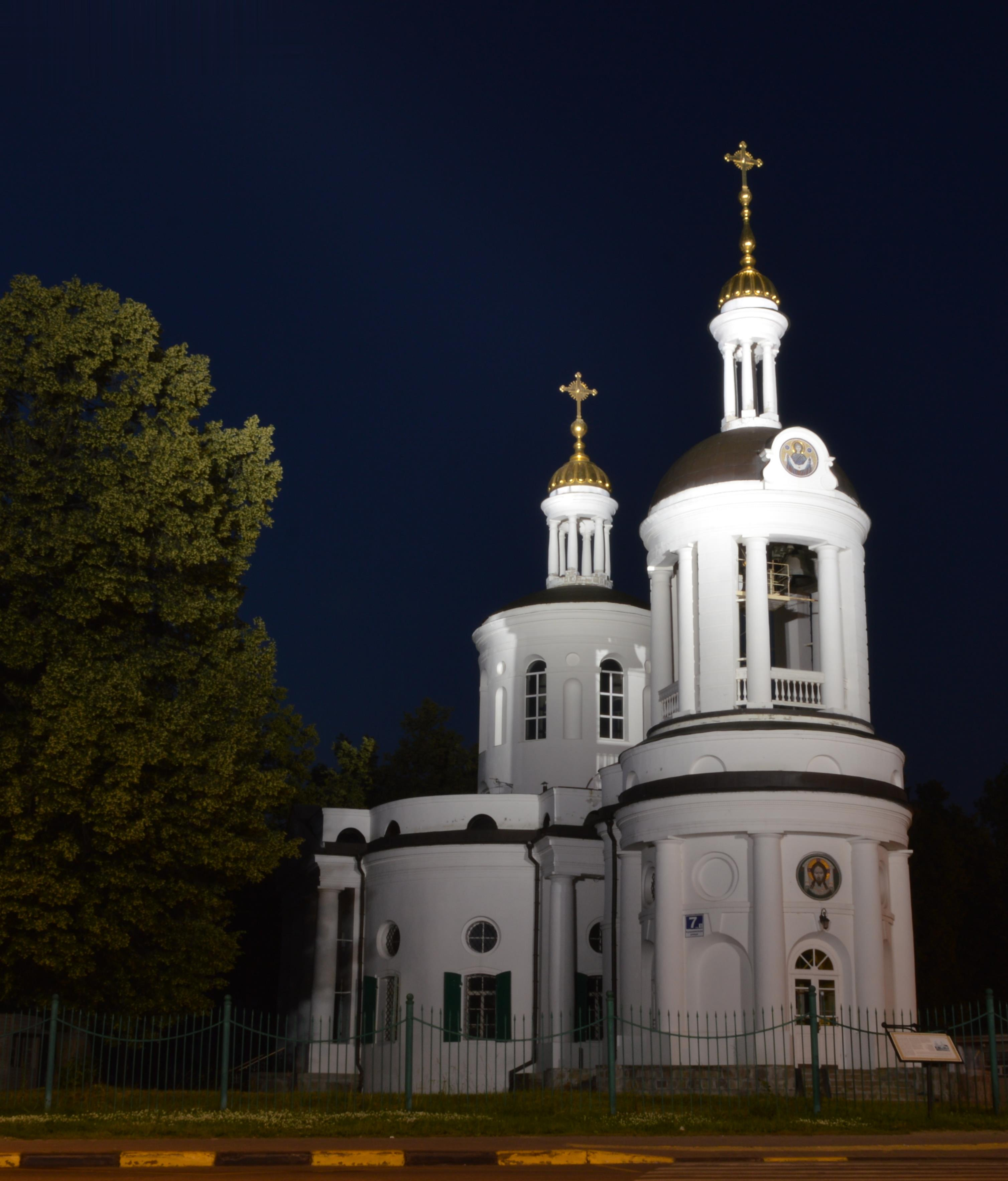 Храм Влахернской иконы Божией Матери в Кузьминках